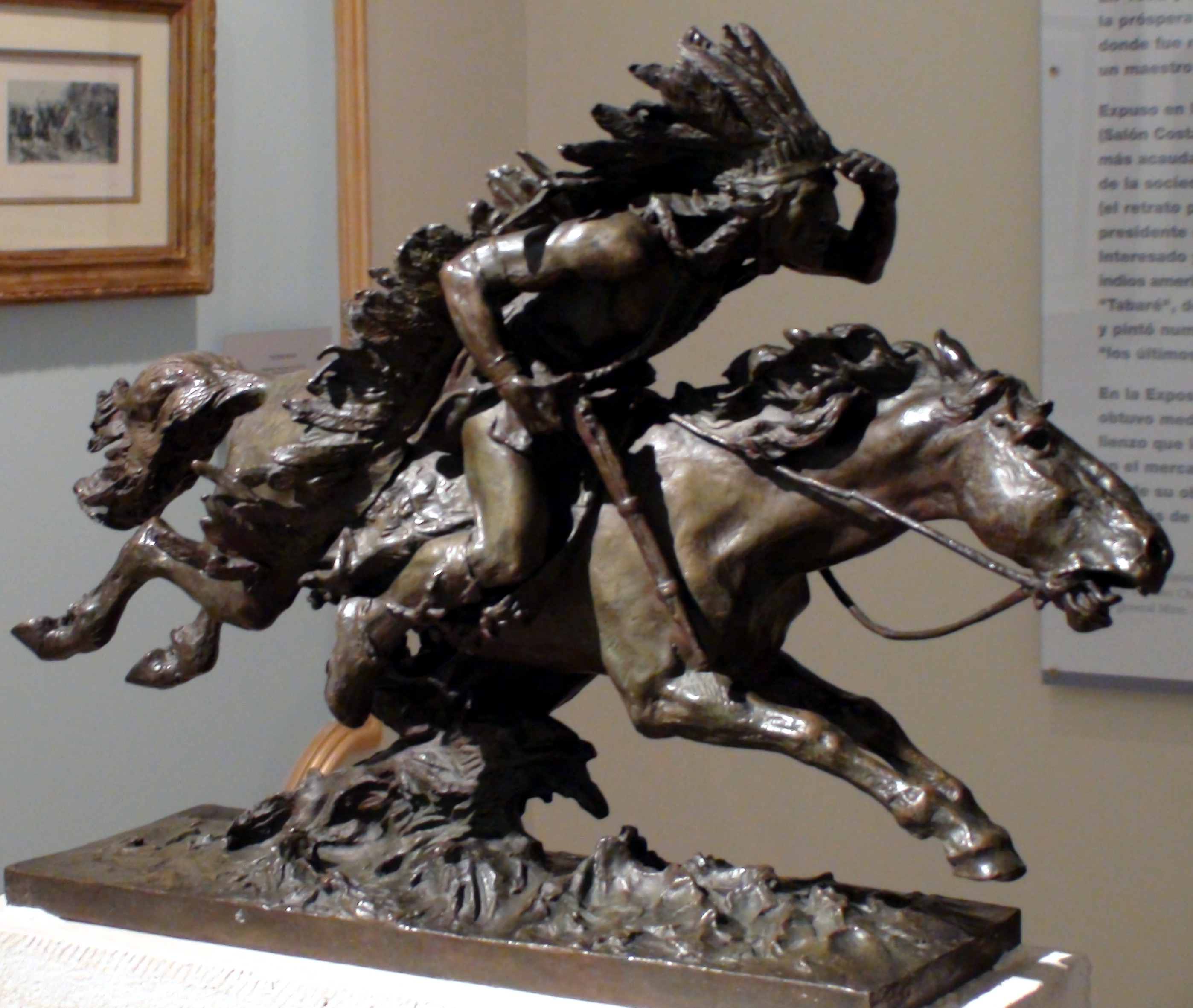 El piel roja. Estatua de bronce. 56 X 40 X 18 cm.Marca de fundición de M. Colinsg, París. La escultura fué presentada por Ulpiano Checa en el salón oficial de París en 1895. La similitud de este bronce con la obra escultórica de Frederic Remington es más que evidente. Esta obra fue donada al museo Ulpiano Checa por los hijos del pintor en 1955